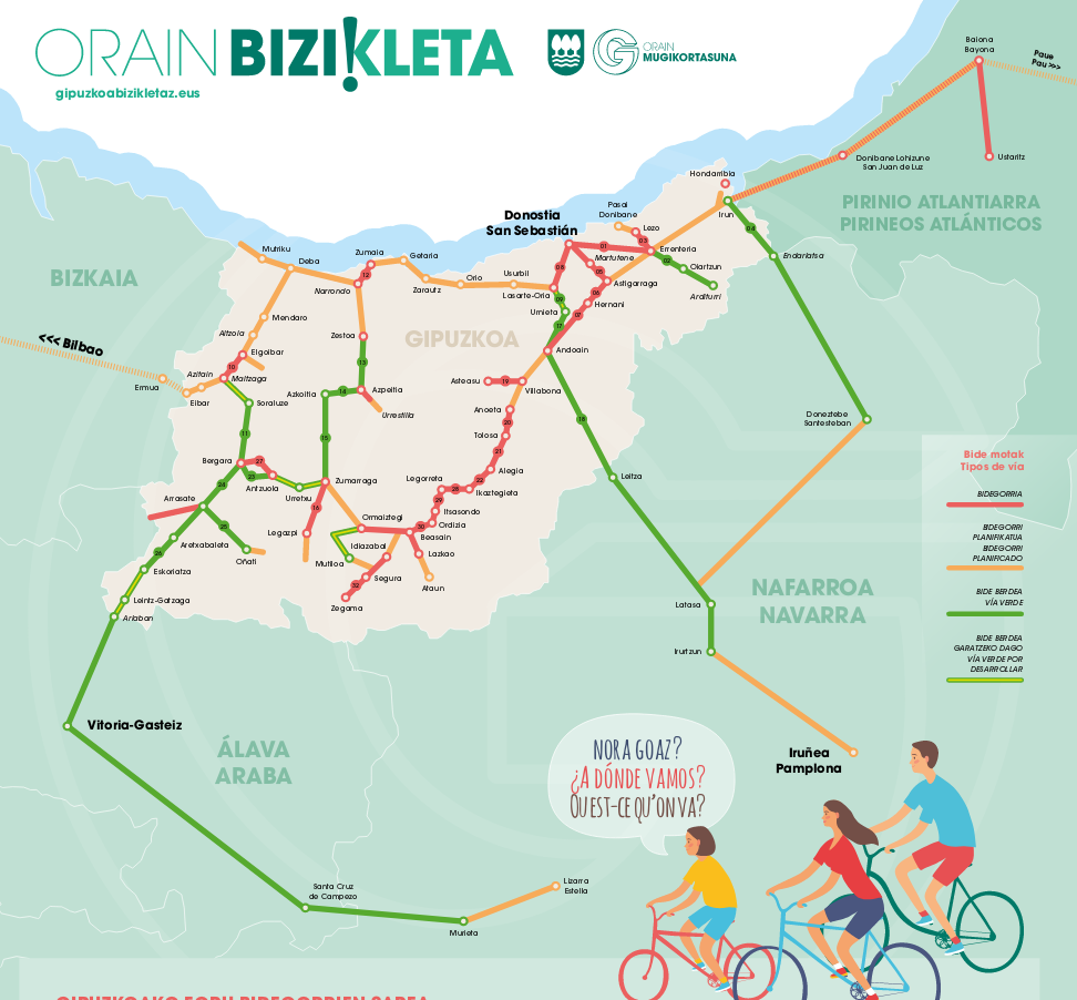 Gipuzkoako foru bidegorrien mapa